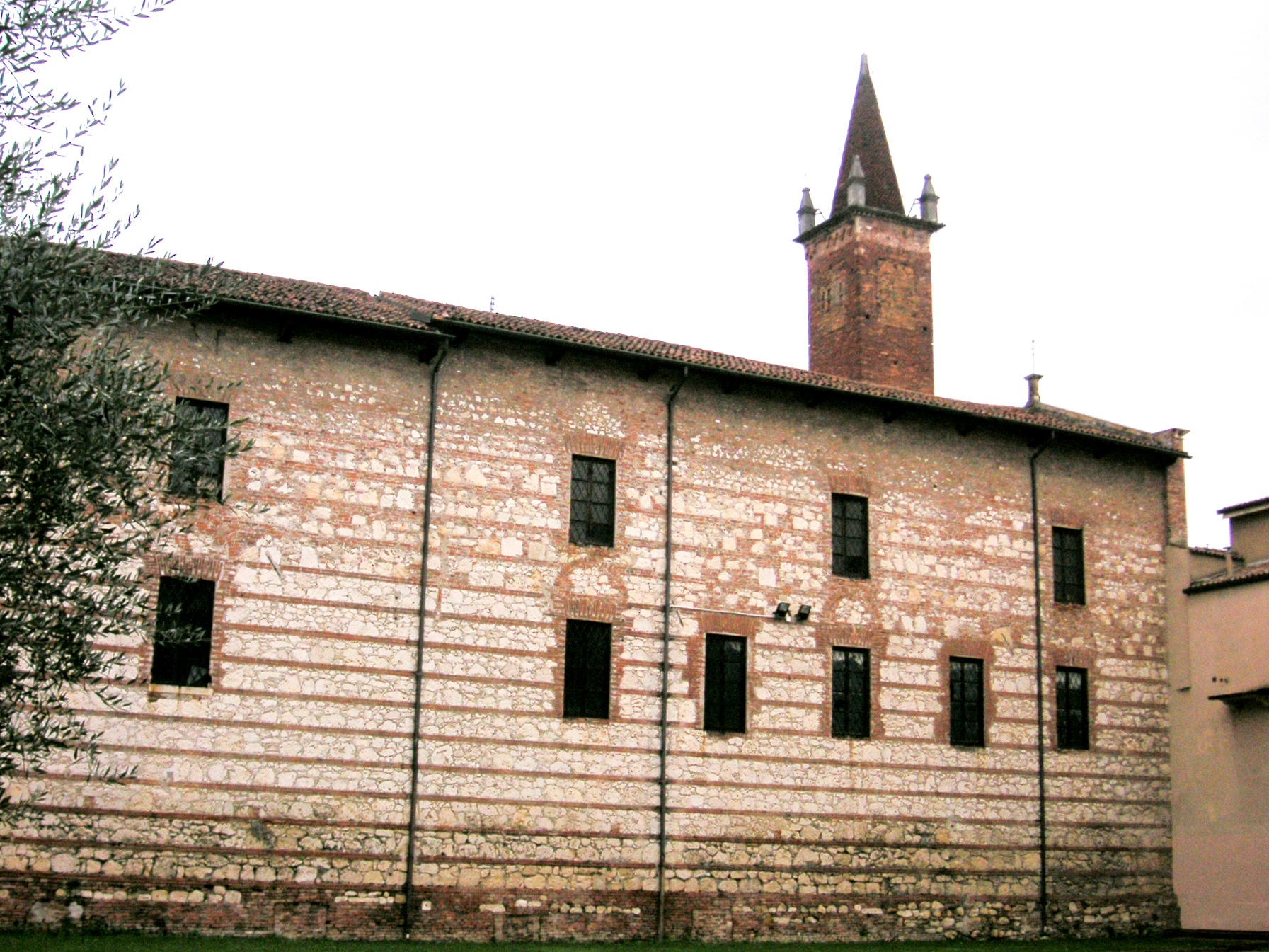 Ex-convento e campanile della chiesa di San Tommaso in Vicenza